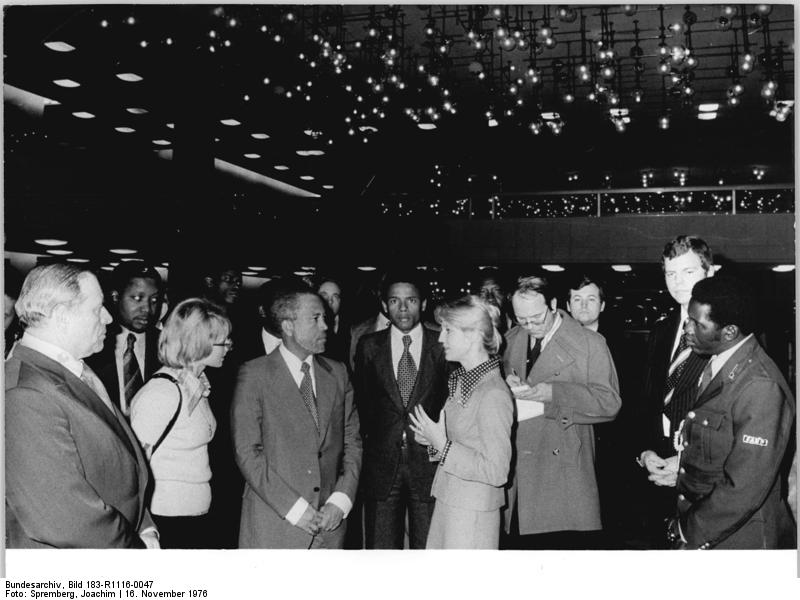 ADN-ZB Spremberg 16.11.76 Berlin: Besuch Luiz Cabrals Die Mitglieder der Partei- und Staatsdelegation der Republik Guinea-Bissau unter Leitung von Luiz Cabral, stellvertretender Generalsekretär der Afrikanischen Unabhängigkeitspartei von Guinea und den Kapverden und Vorsitzender des Staatsrates der Republik Guinea-Bissau (3.v.l.vorn), besichtigten am 16.11. den Palast der Republik am Berliner Marx-Engels-Platz.